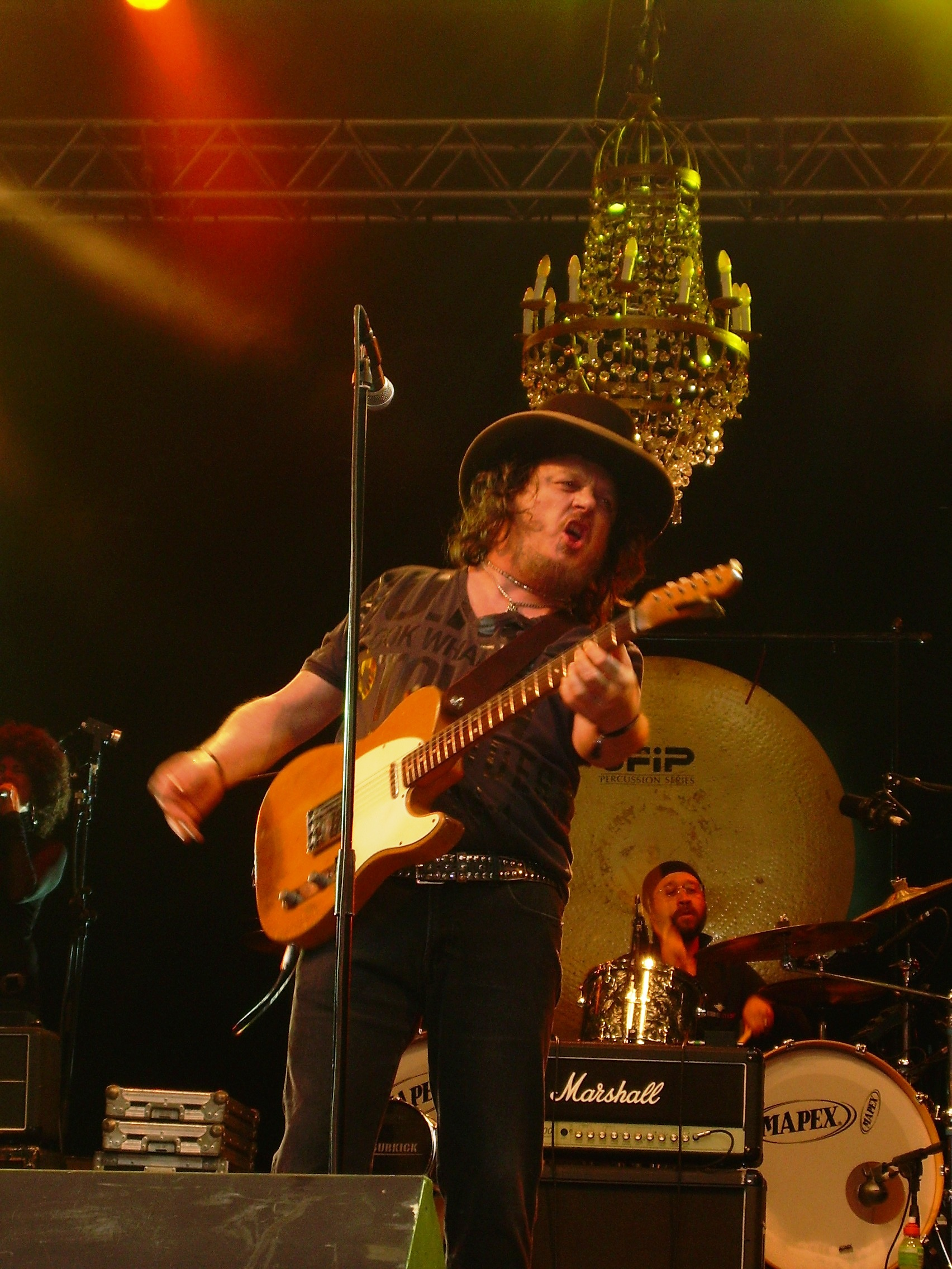 Italian singer Zucchero live at Skanderborg Festival 2007, Denmark